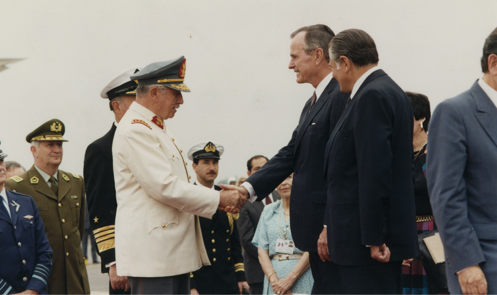 El Presidente Aylwin junto al Gral. Pinochet y al Pdte. de U.S.A. George Bush.